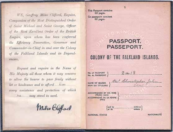 British passport of the Colony of the Falkland Islands, 1947.